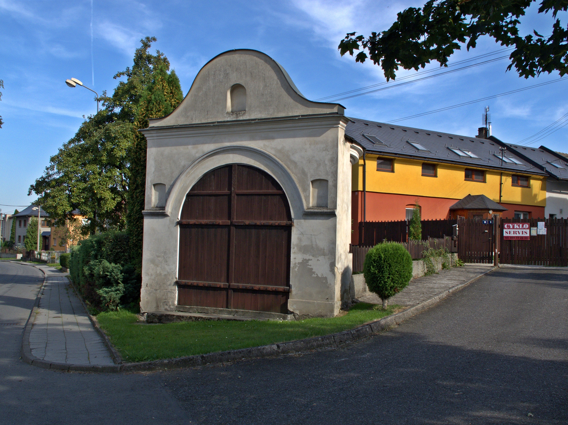 Kaple, Dlouhá, při čp. 9, Komárov (Opava).